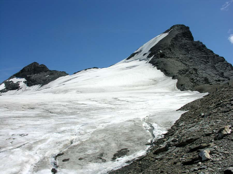 Aiguille de la Grande Sassière à droite ainsi que la Petite Sassière à gauche